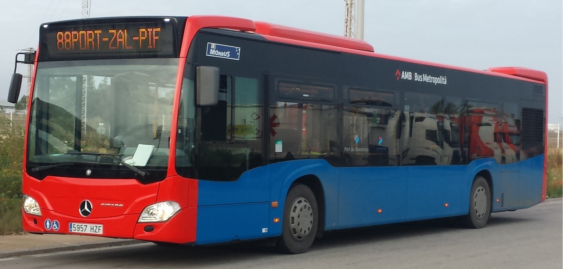 Autobús de la línia 88 al ZAL Prat.